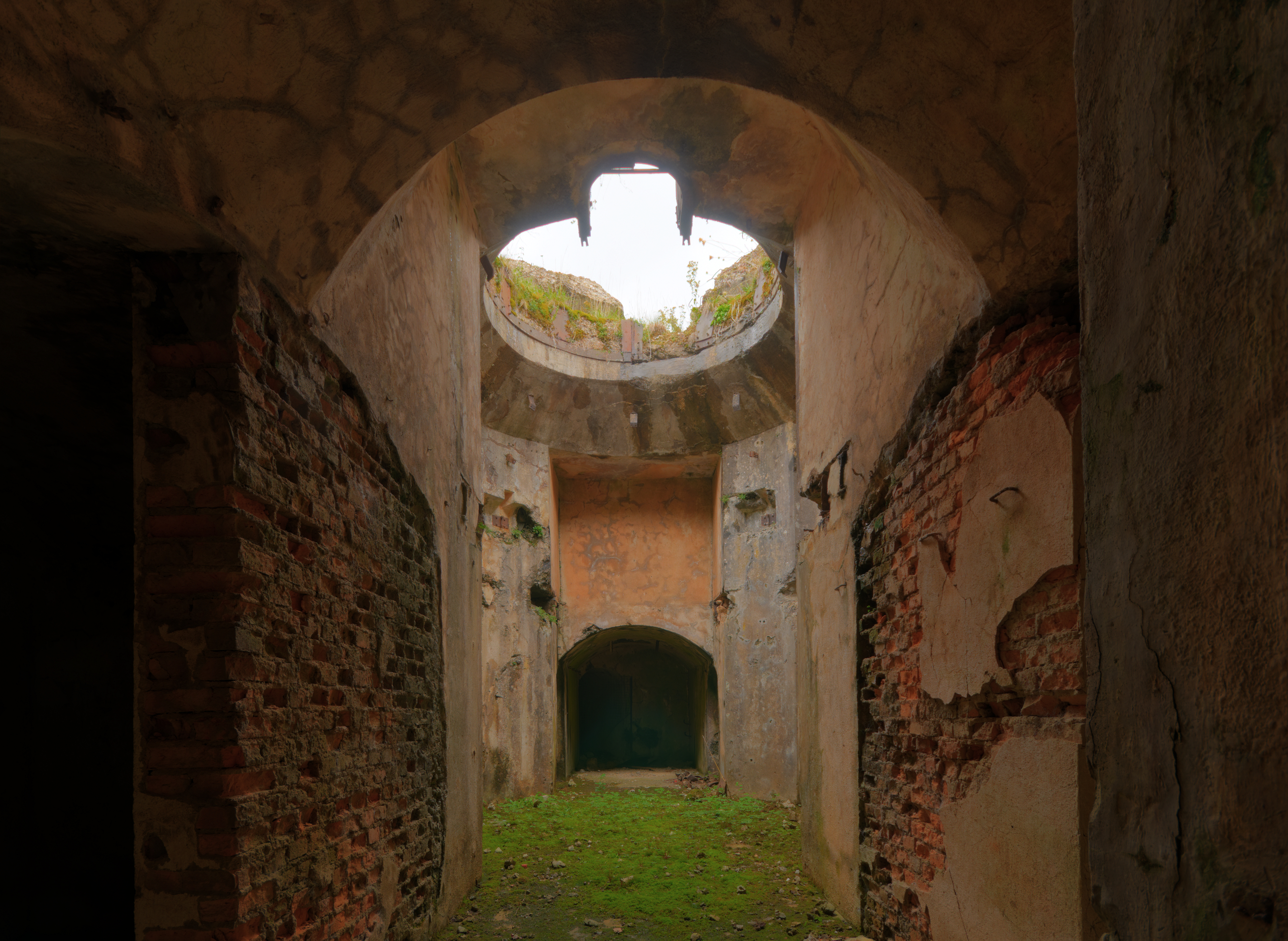 This photograph was taken with a Nikon D300 Fort de Bessoncourt : emplacement d'une des tourelles de 75 (HDR) (inscrit MH n°PA00135350).